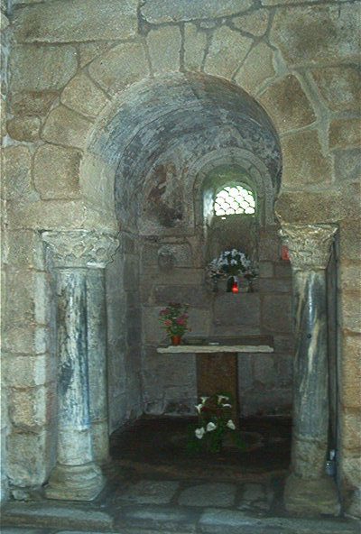 Capela da cabeceira da igrexa de Santa Comba de Bande